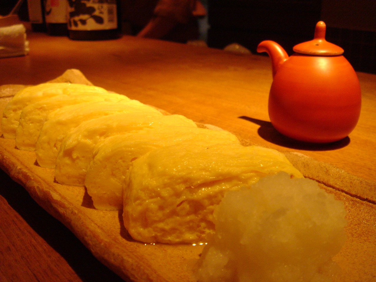 at kuon, tokyoegg roll